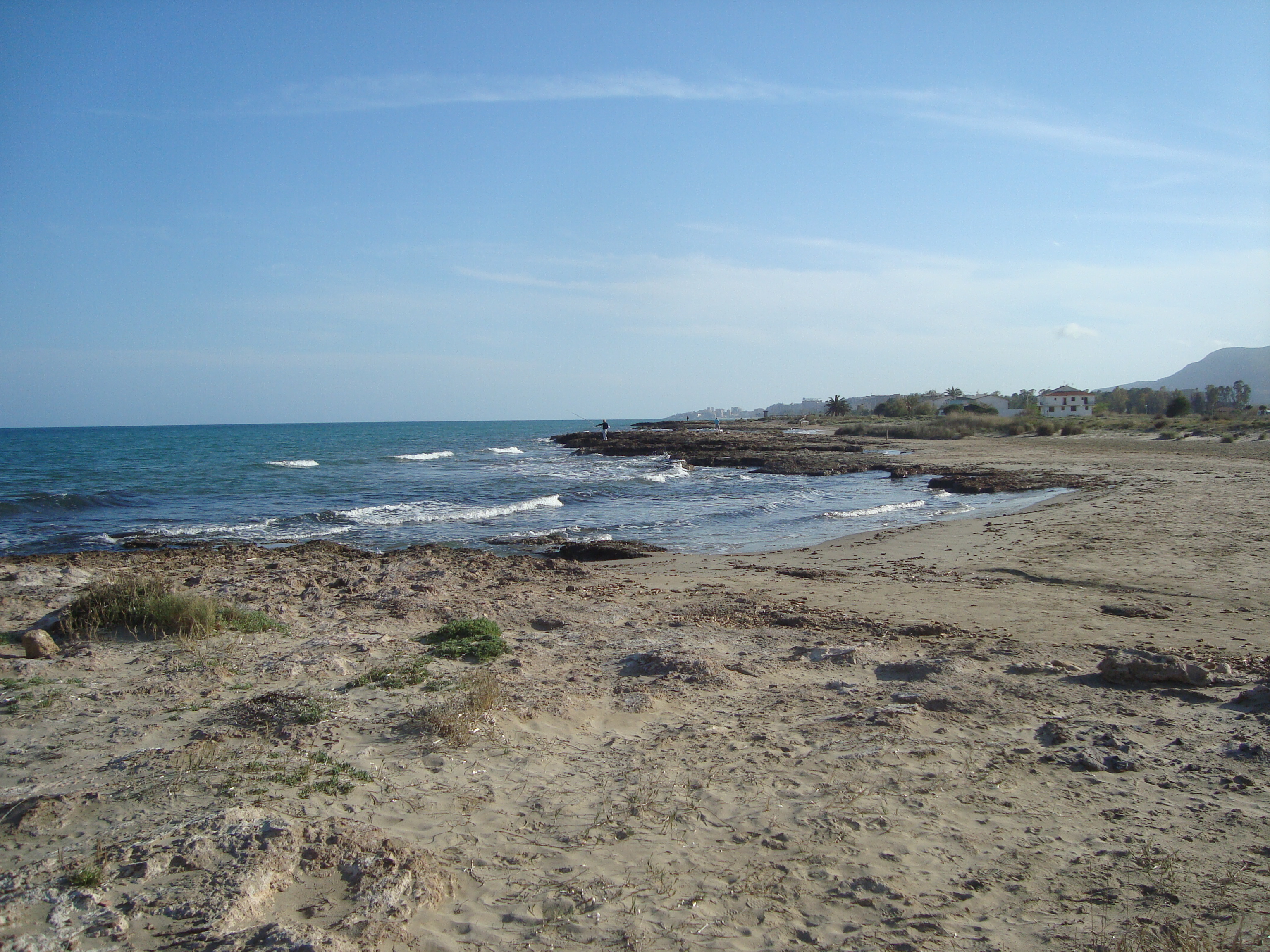 Platja de la Torre de la Sal (Cabanes) This is a a photo of a beach in the Land of Valencia, Spain, with id: PL-1431